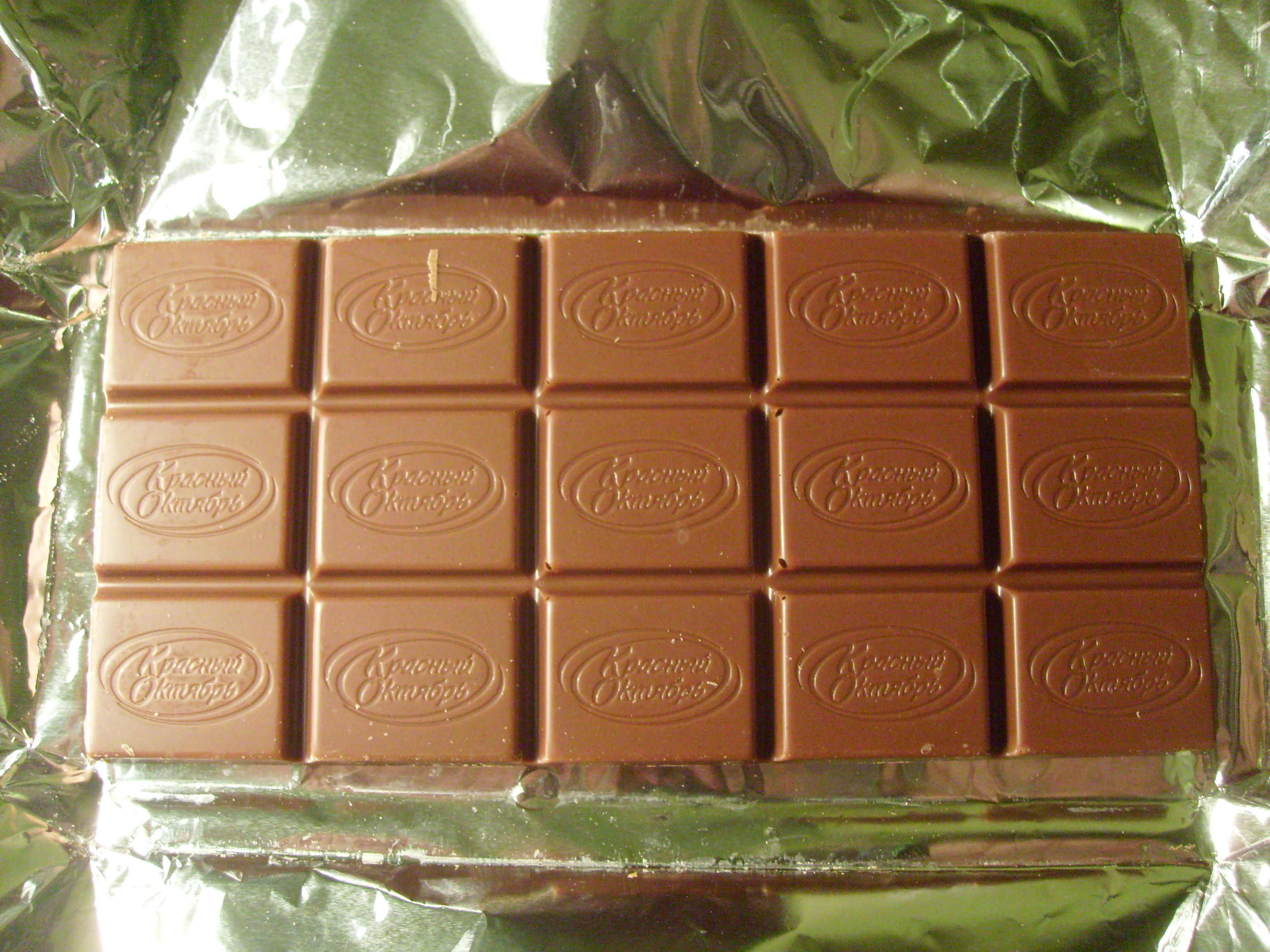 Шоколад «Алёнка» изнутри